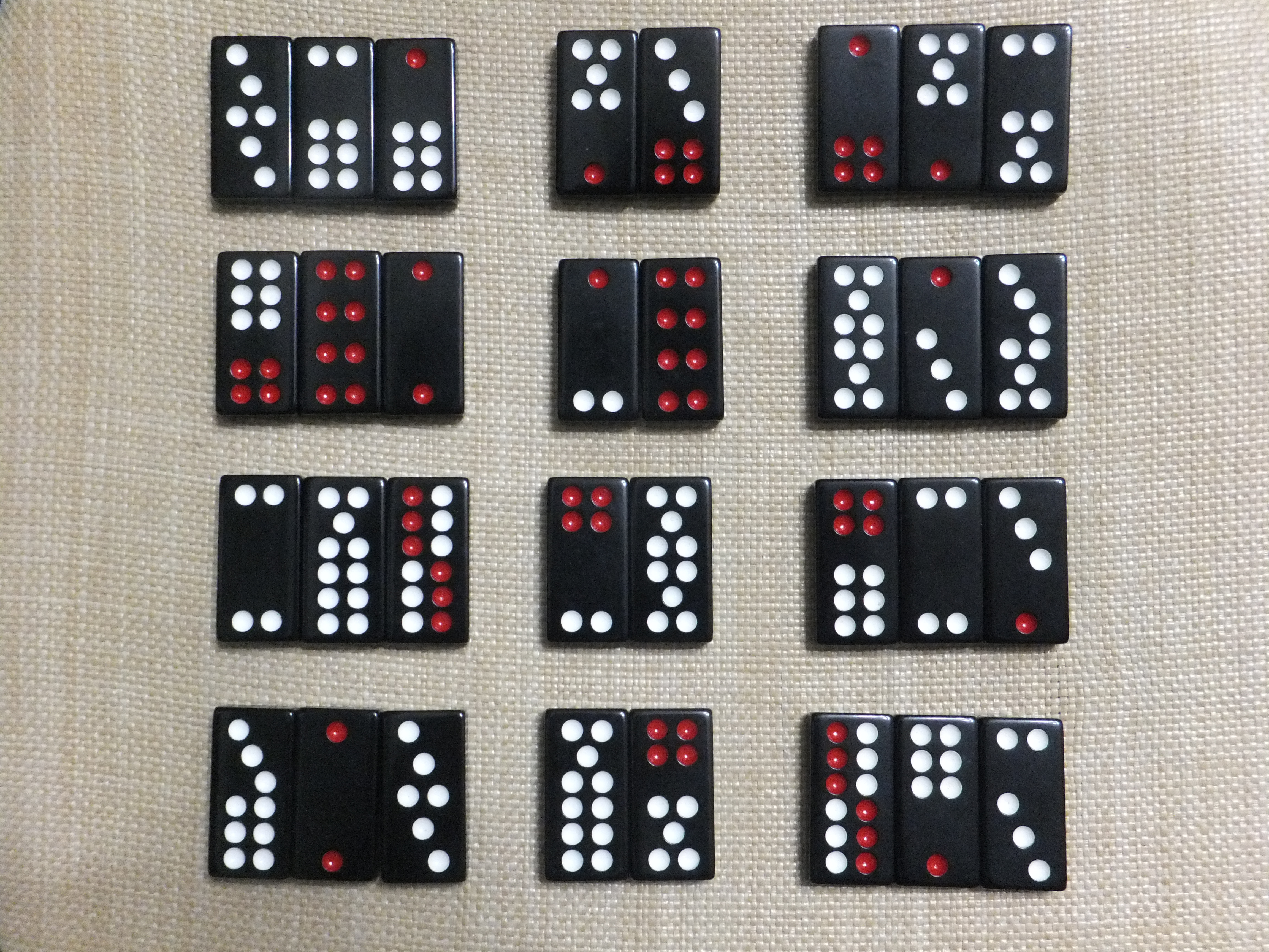 中文（台灣）: 想荊州的一種隨機佈置